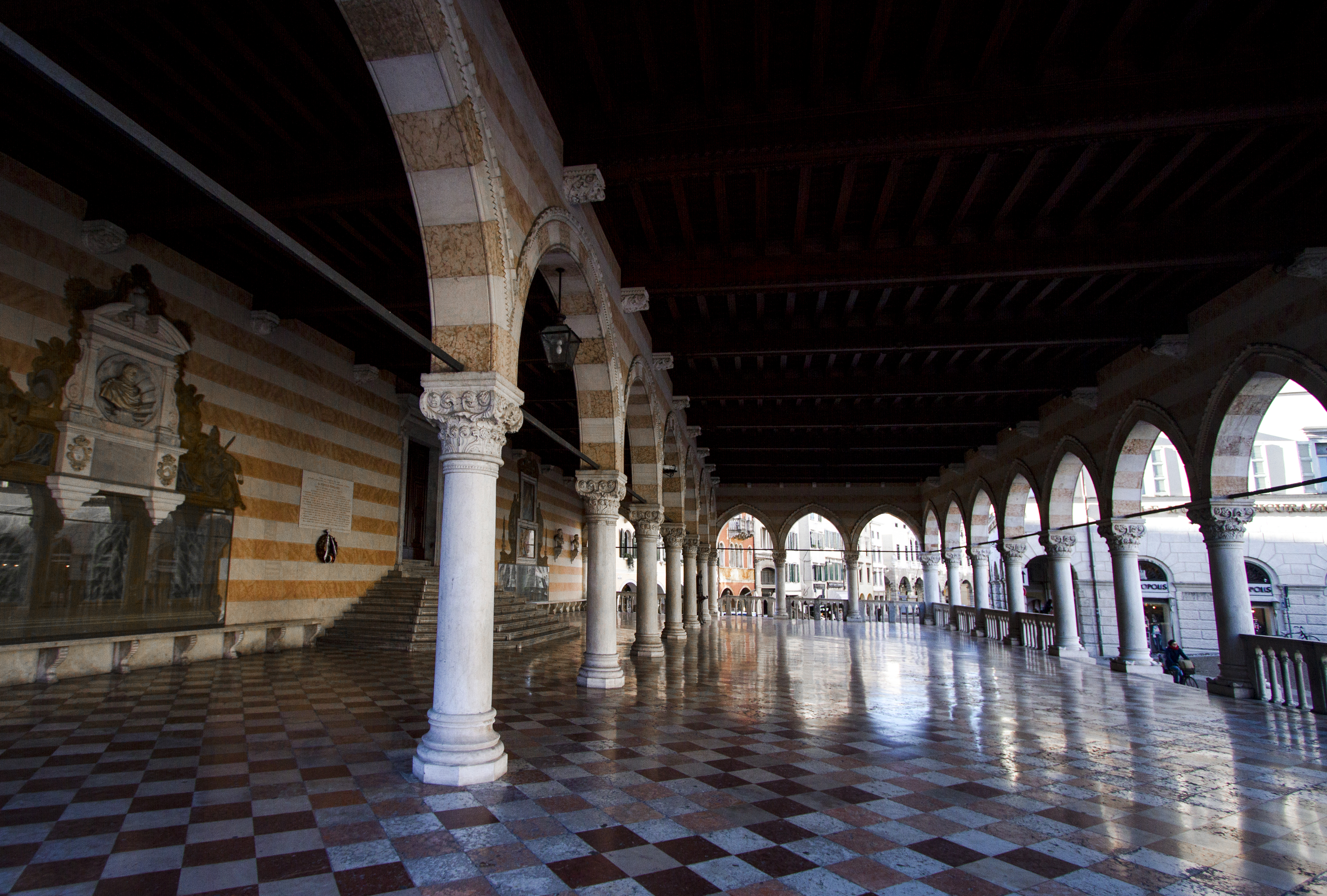 Foto delle arcate della Loggia, scattata a Udine